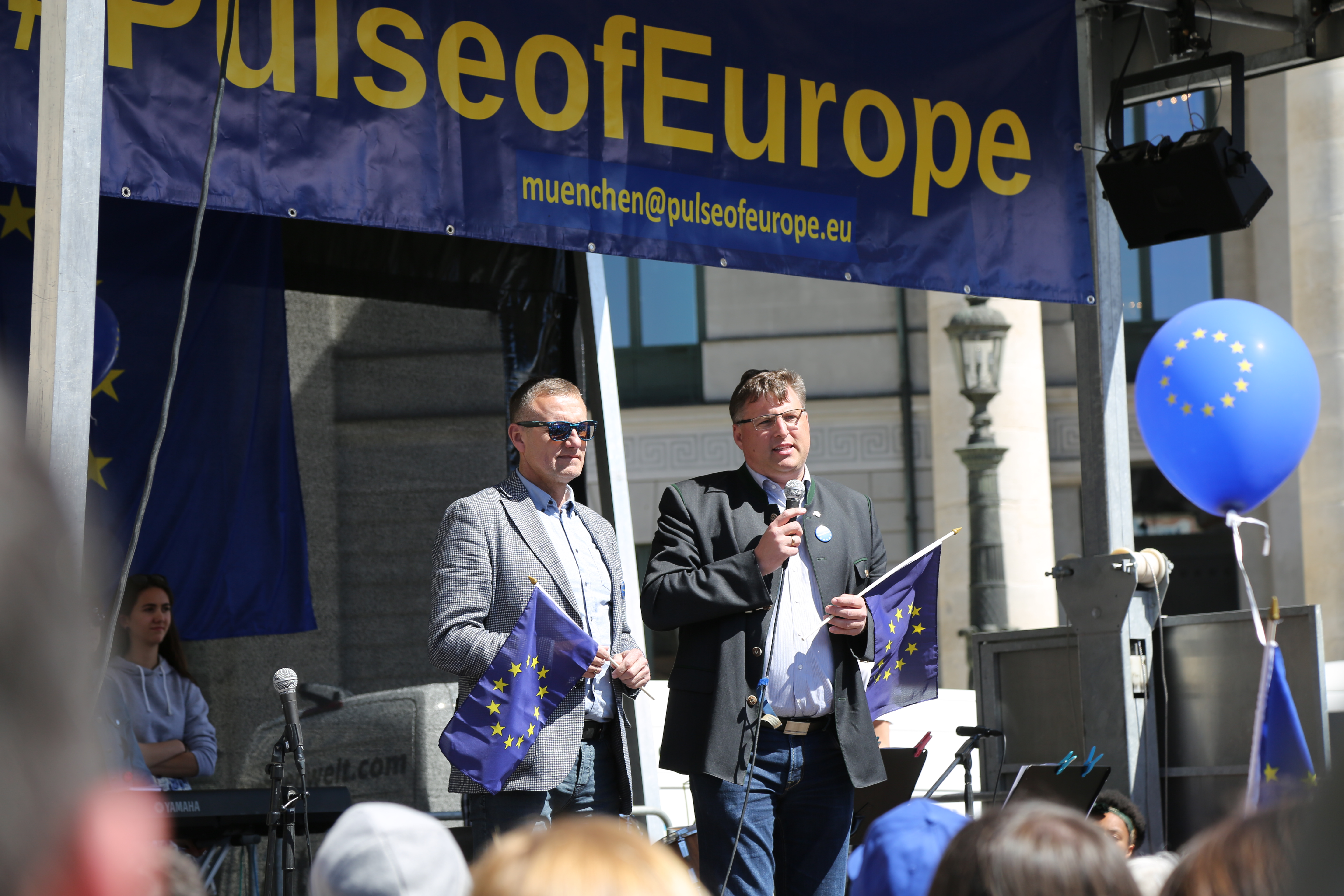 Pulse of Europe Veranstaltung am 30. April 2017 in München, Max-Joseph-Platz. Der Landrat des Powiat Oświęcimski (Landkreis Auschwitz), Zbigniew Starzec, und der Landrat von Dachau, Stefan Löwl